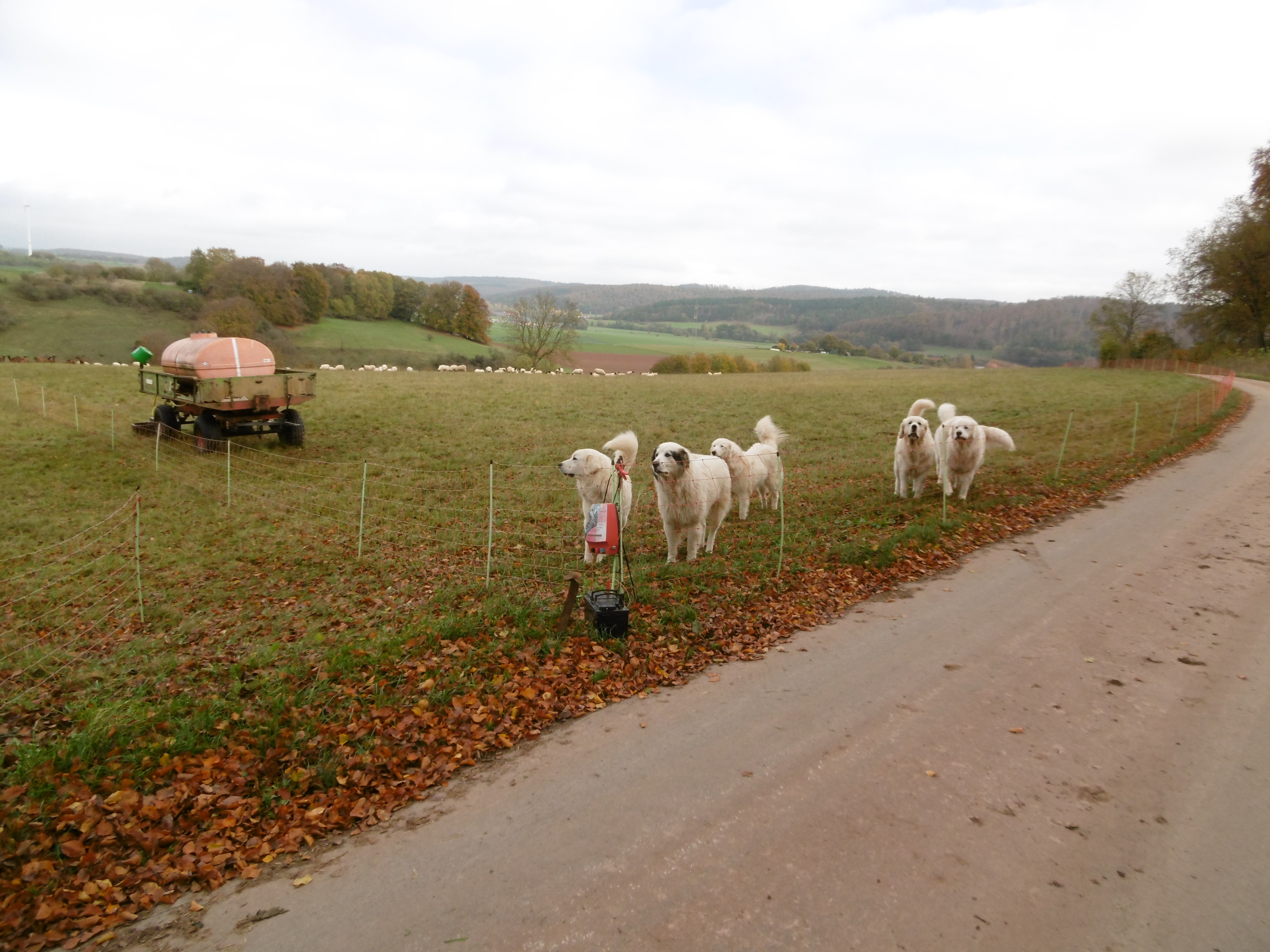 Naturschutzgebiet Glockengrund mit Herdenschutzhunden, Schaf- und Ziegenherde vom südlichen NSG-Rand am Glockenrücken Richtung Nordost.